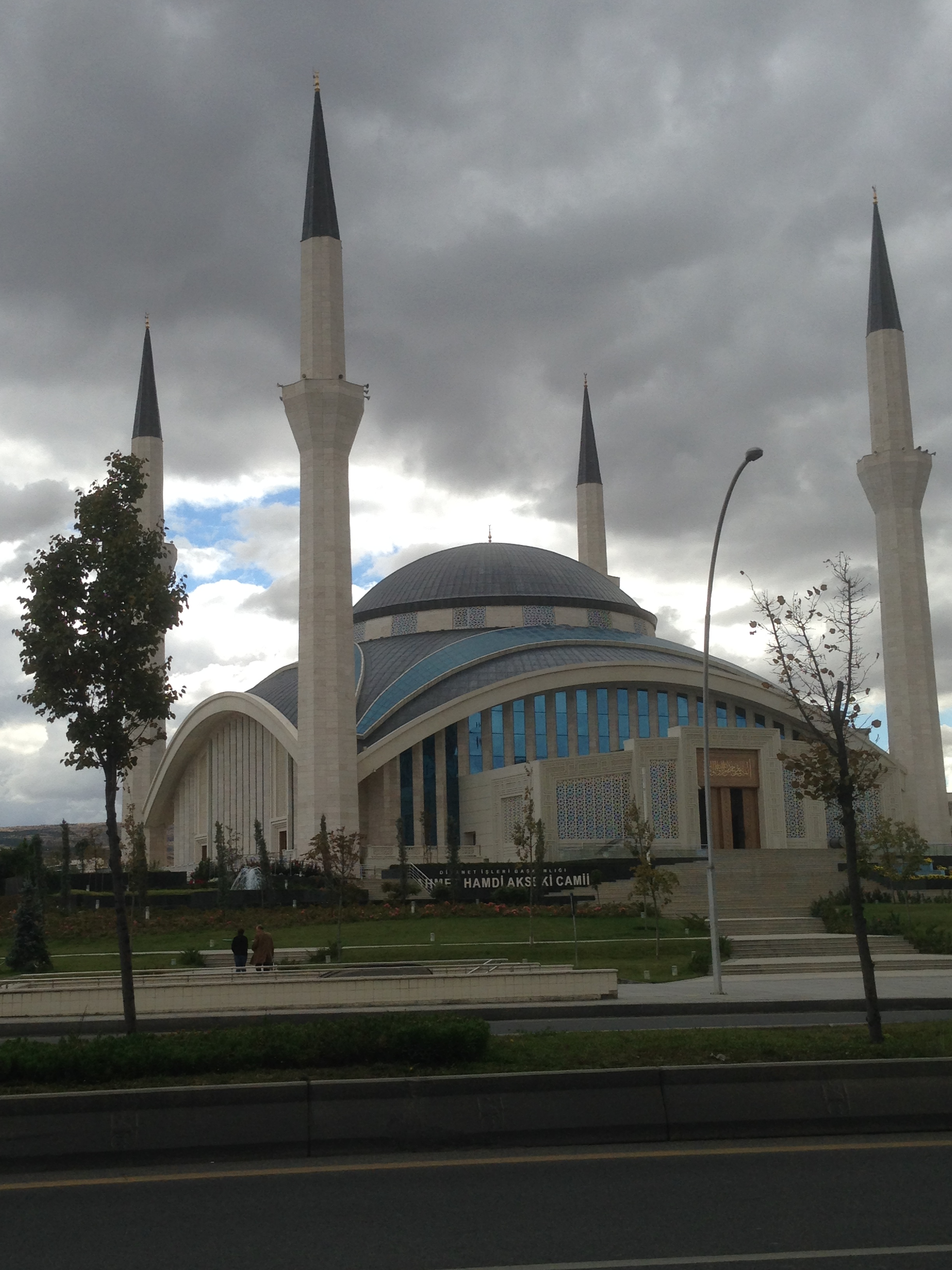 Türkiye Diyanet İşleri Başkanlığı Ahmed Hamdi Akseki Camii, ANKARA